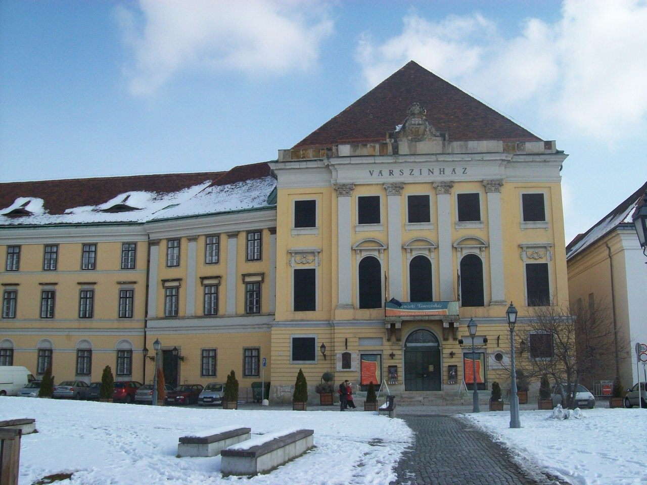 A Várszínház épülete a budai Várban (Budapest)